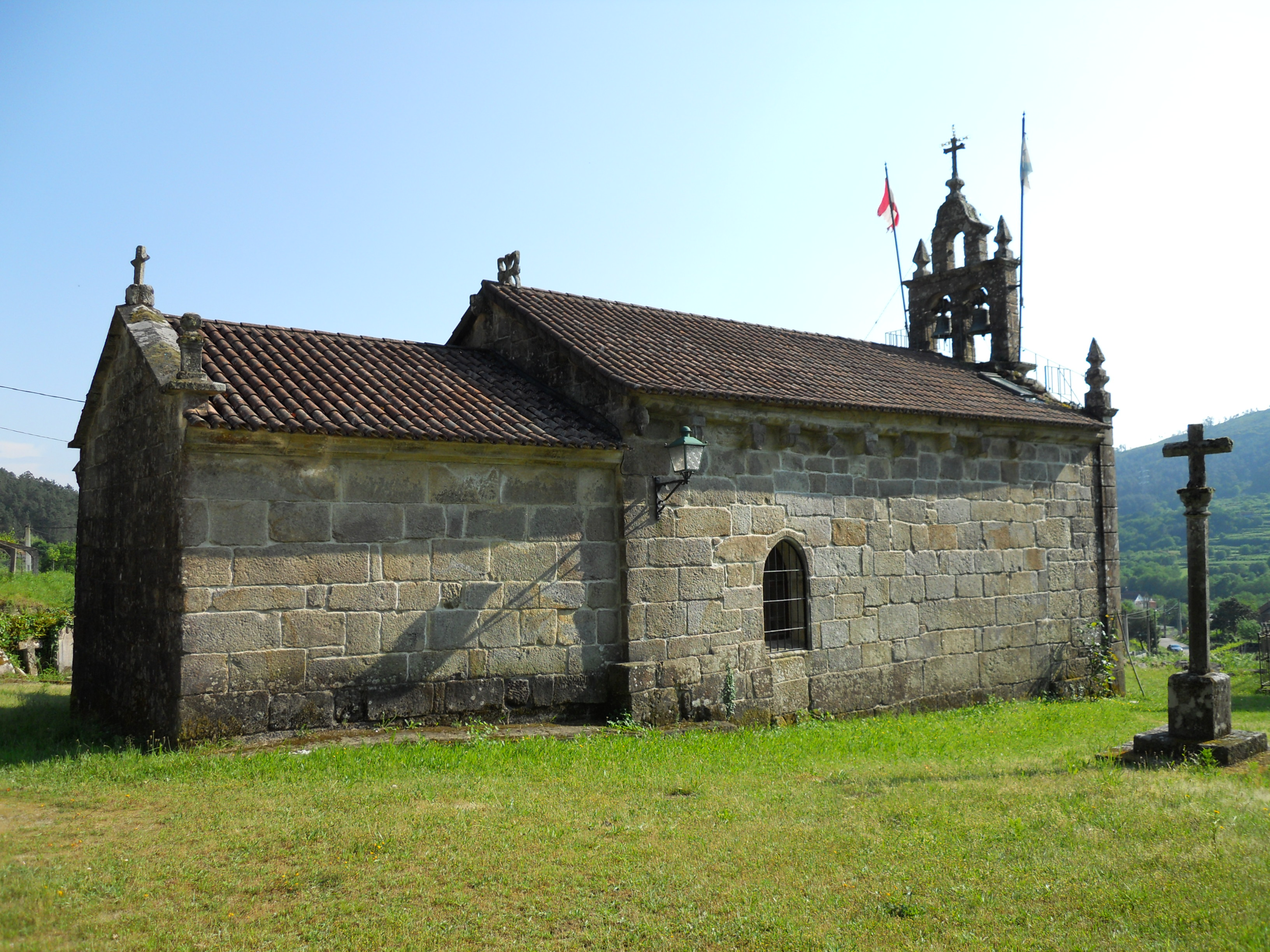 Construida en el siglo XII, conserva los muros de la nave y el ábside, de planta rectangular ambos. La fachada sin embargo fue sustituida en el siglo XVIII y se adosó la sacristía en el lado sur del presbiterio